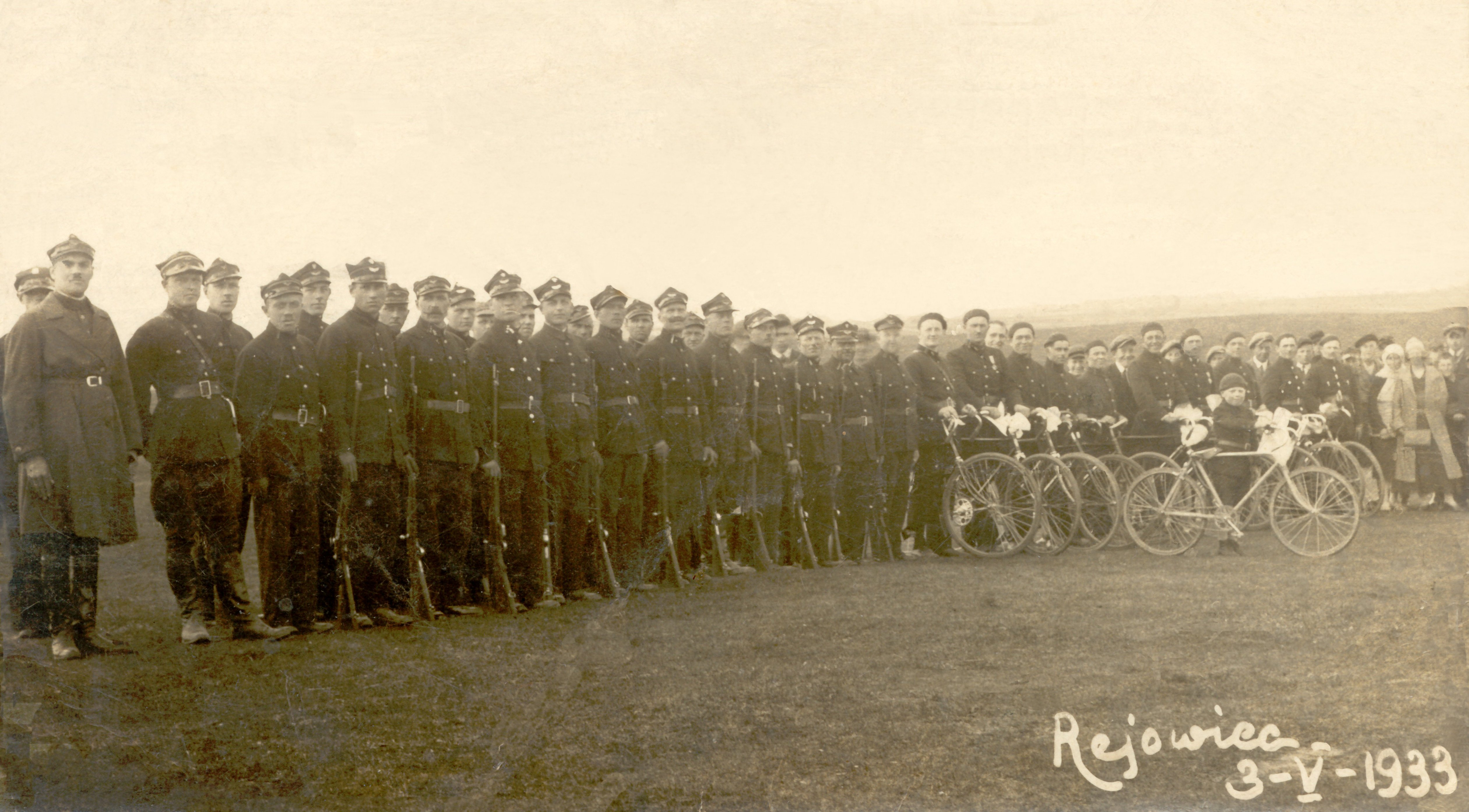 Załoga stacji PKP w Rejowcu (Fabrycznym)